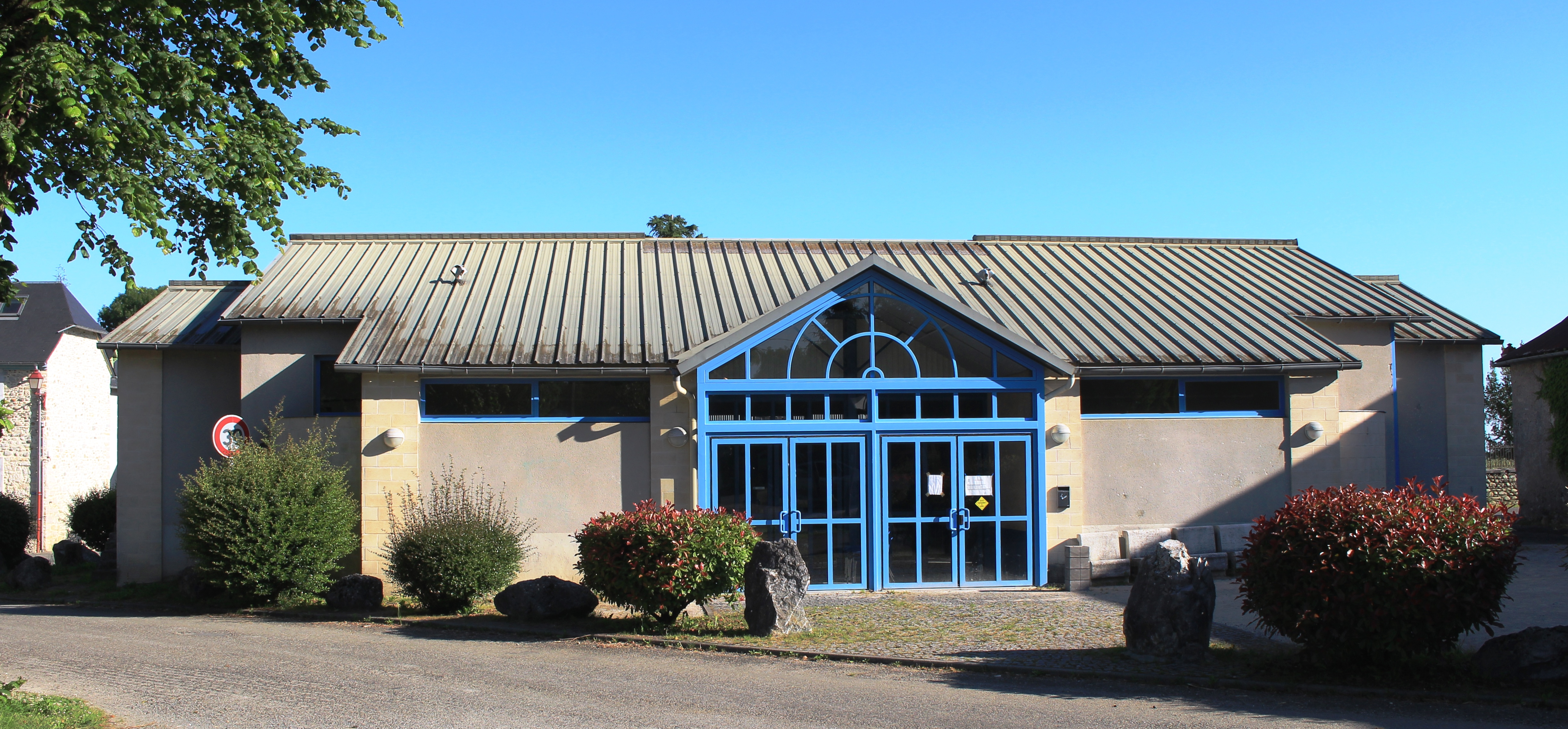 Salle des fêtes de Montgaillard (Hautes-Pyrénées)